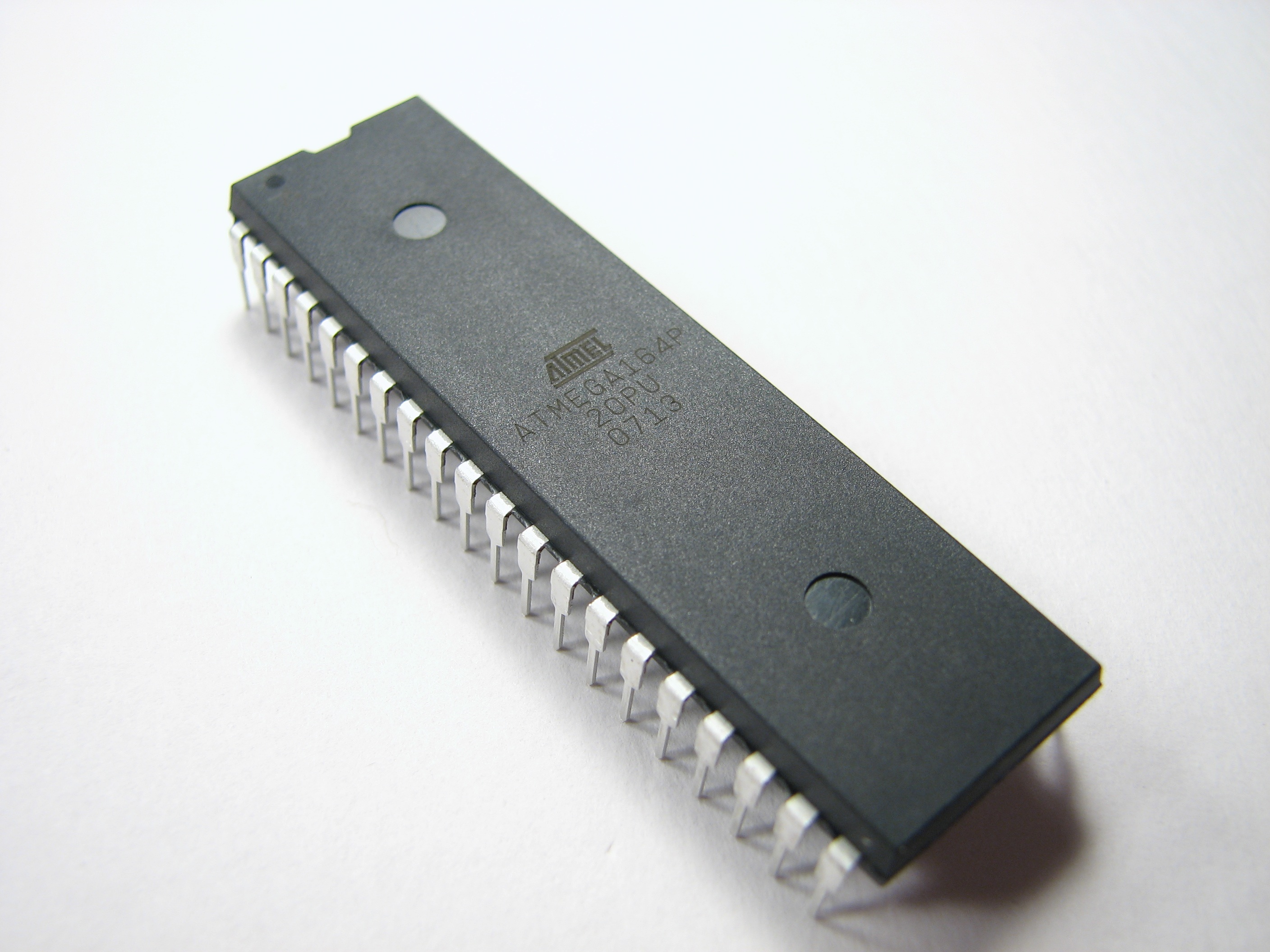 Atmel ATmega164P microcontroller